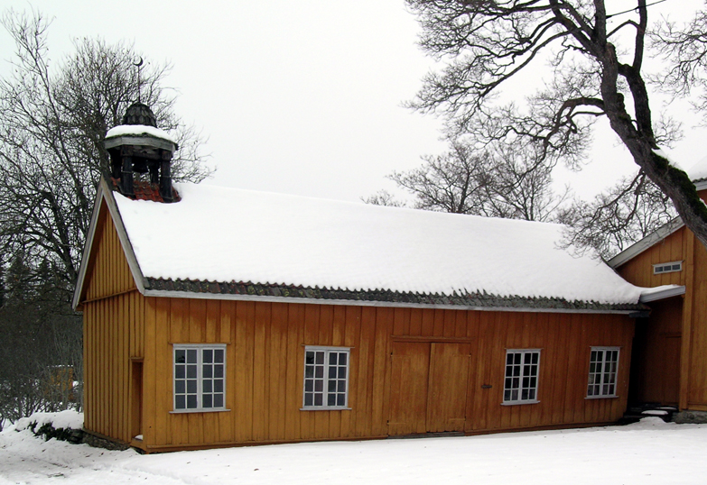 Stenberg, Vestre Toten, Norway. Vognskjul, built between 1805 and 1826.